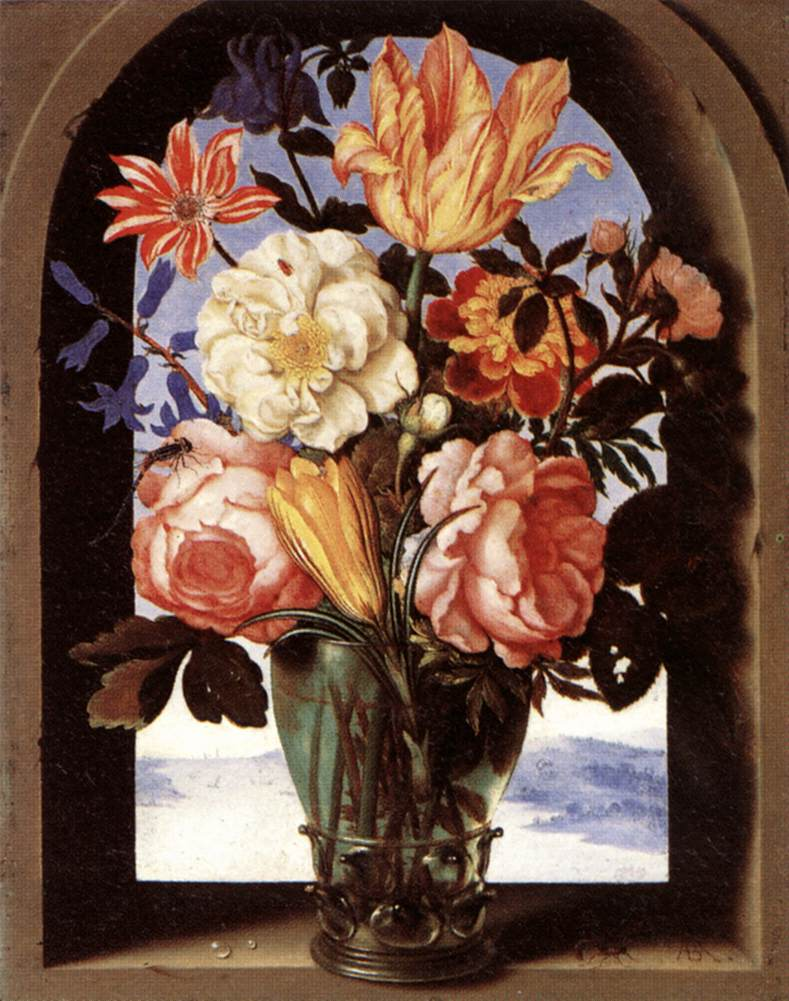 Potpourree von frischen Blüten, die der Maler vermutlich nicht zeitgleich abgemalt, sondern diese jeweils einzeln hinzugefügt hat. Der Fensterblick aus der steinernen Nische gibt eine Andeutung einer Landschaft und suggeriert damit Weite; ein Skorpion und Wassertropfen auf der Fensterbank.